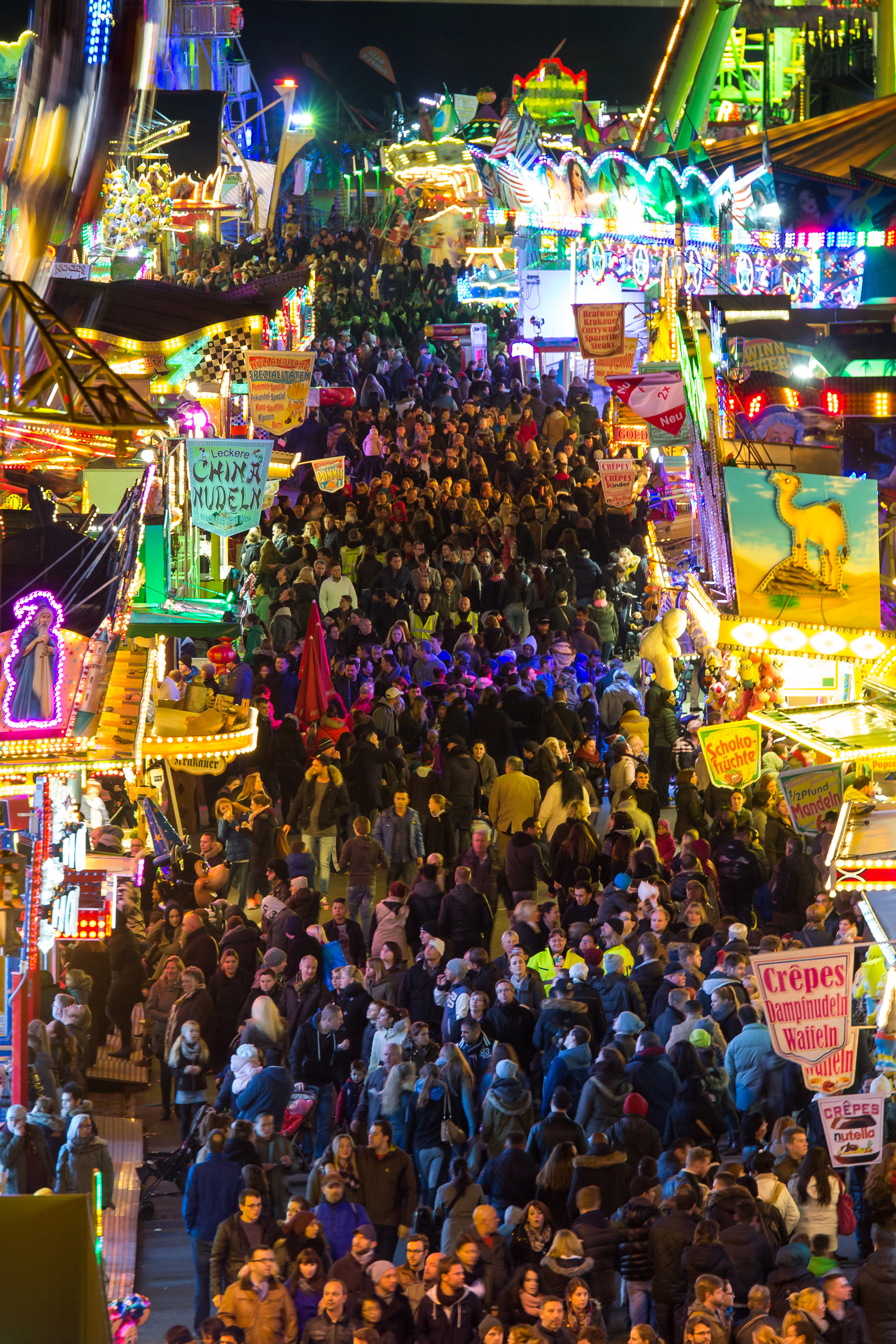 Deutzer Herbstkirmes 2014, Hauptachse